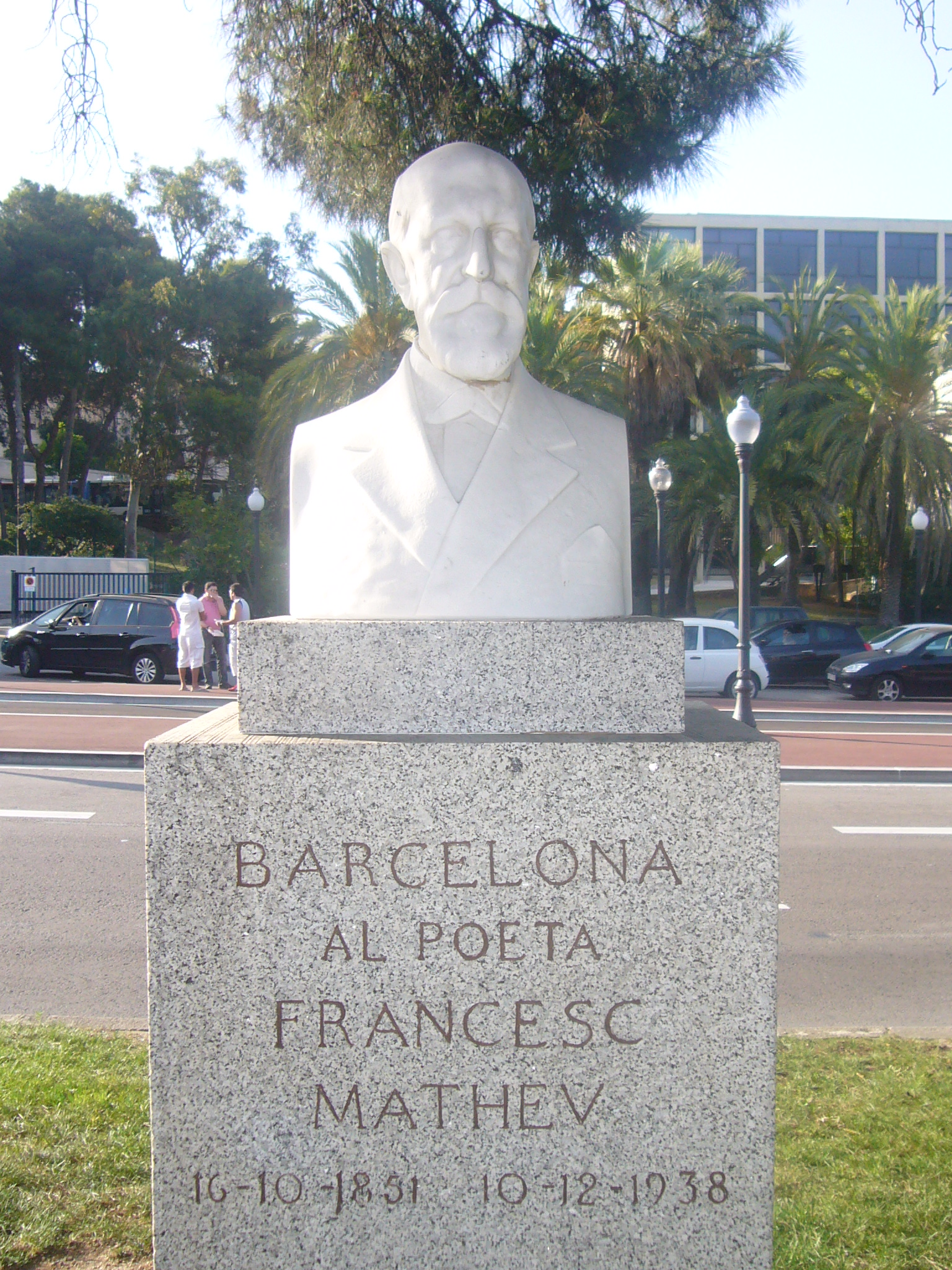 Bust de Francesc Matheu i Fornells, situat a l'avinguda Diagonal, a l'alçada de la Facultat d'Econòmiques de la UB